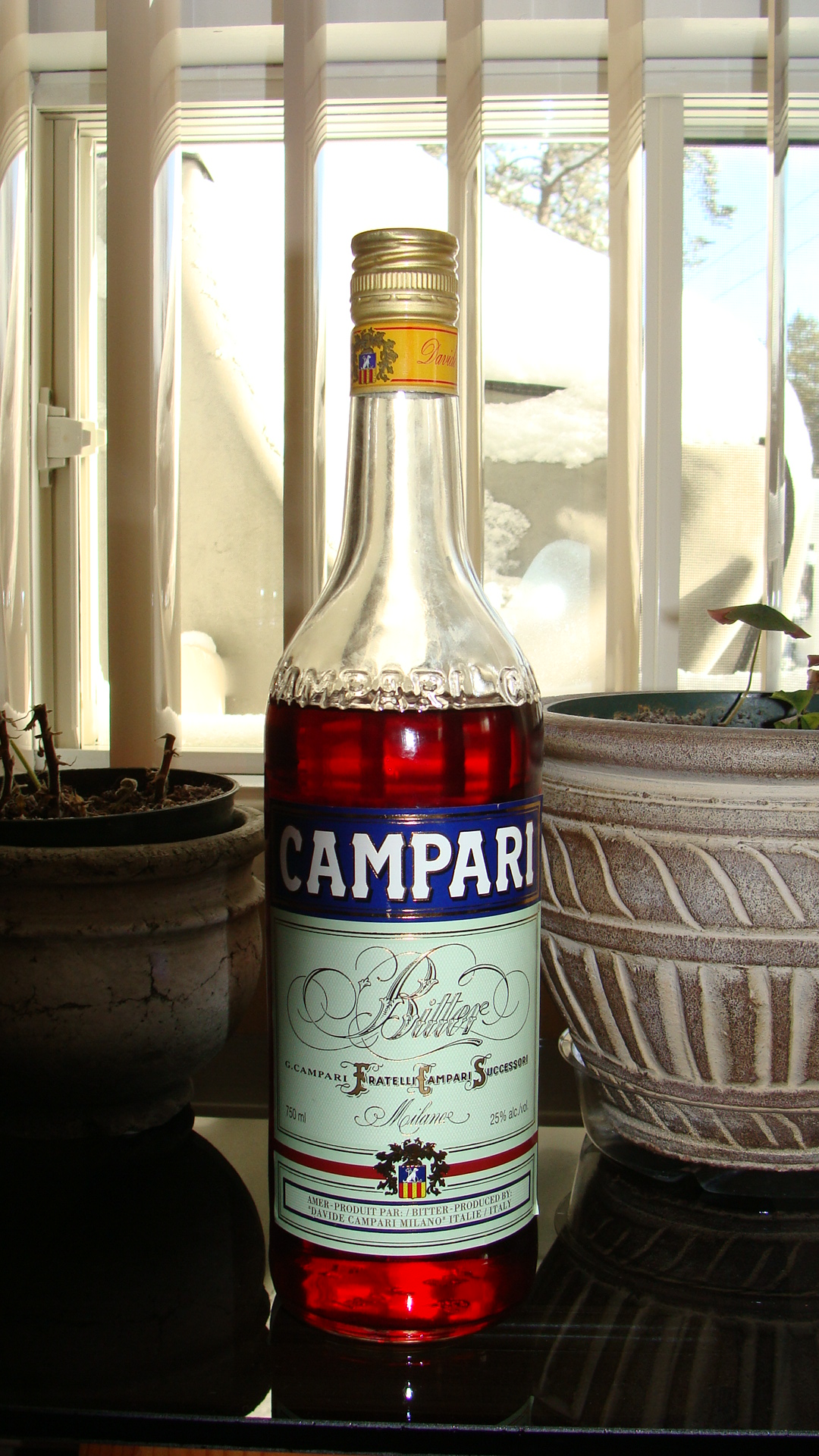 Bouteille de Campari, une boisson alcoolisée.